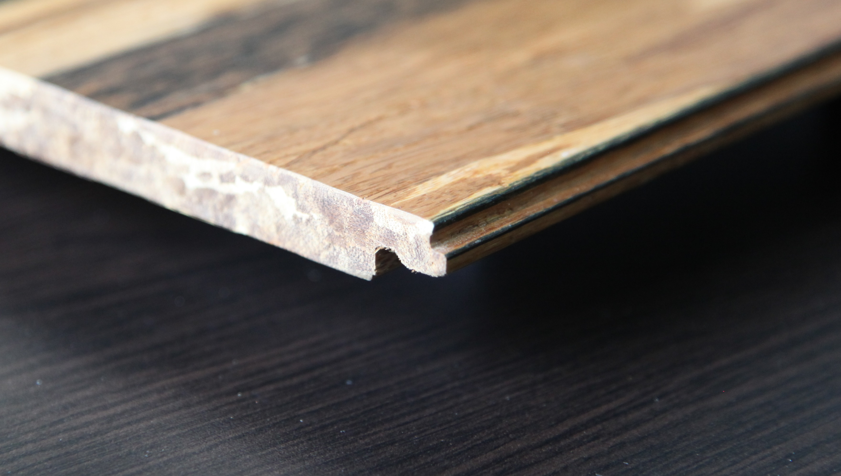 Бамбук прессованный. Демонстрация продольного замка и волокон разного цвета, торцевой замок срезан